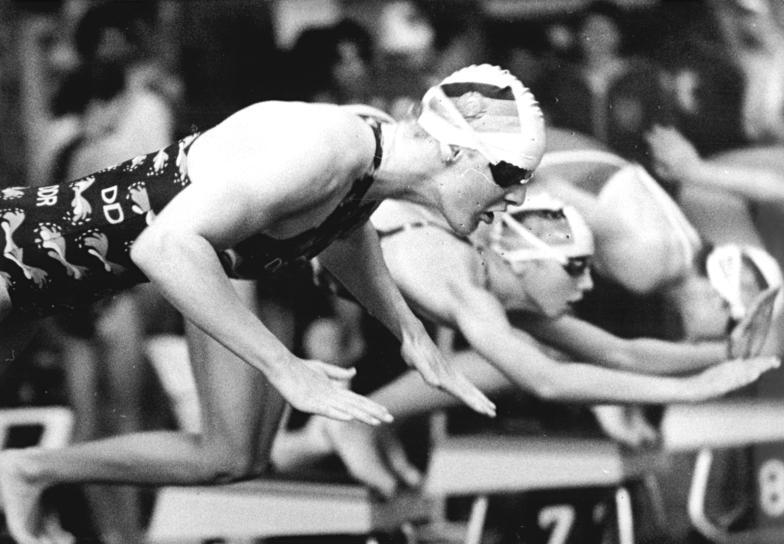 Birgit Meinecke ADN-ZB Kluge 22.5.84-fs- Magdeburg: DDR-Meisterschaft im Sportschwimmen- Birgit Meinecke (SC Dynamo Berlin) erzielte im Vorlauf über 100 m Freistil mit 55,66 sec die beste Zeit.